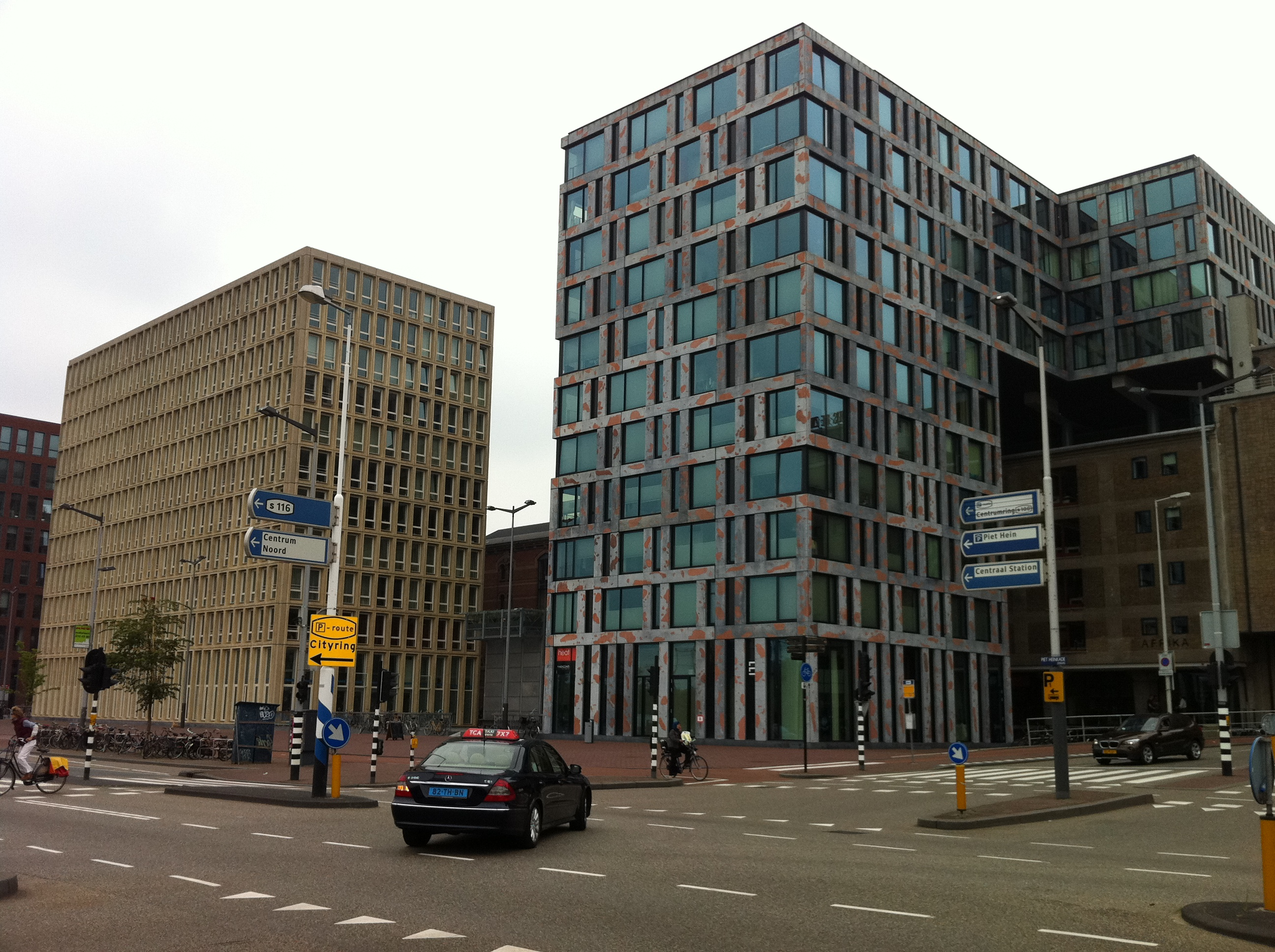 Appartementencomplexen aan de Piet Heinkade en Jollemanhof op de kruising met de Jan Schaeferbrug, gelegen naast het hoofdkantoor van woningcorporatie Ymere